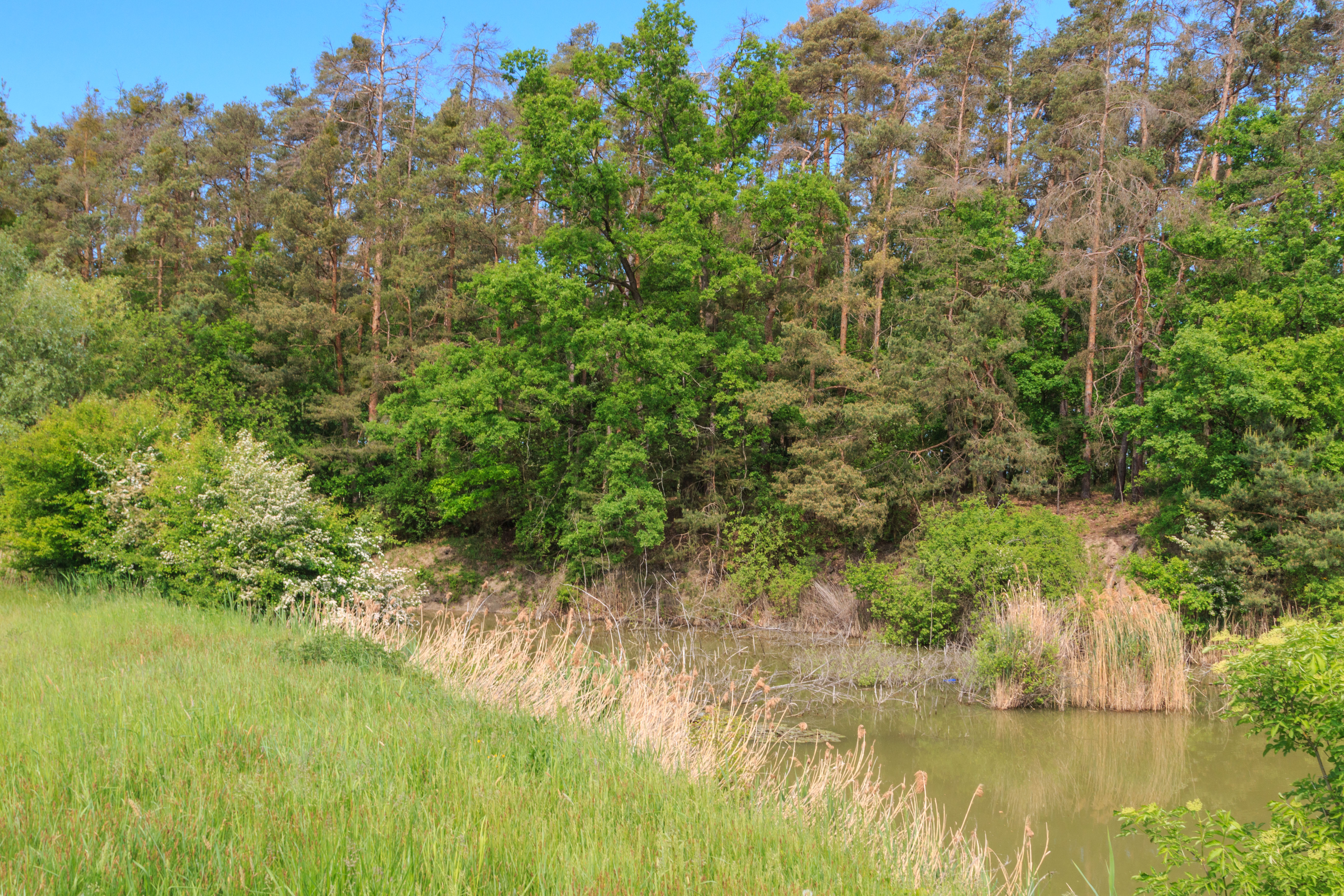 Hliník pod Rokytnem Project: Vodstvo.